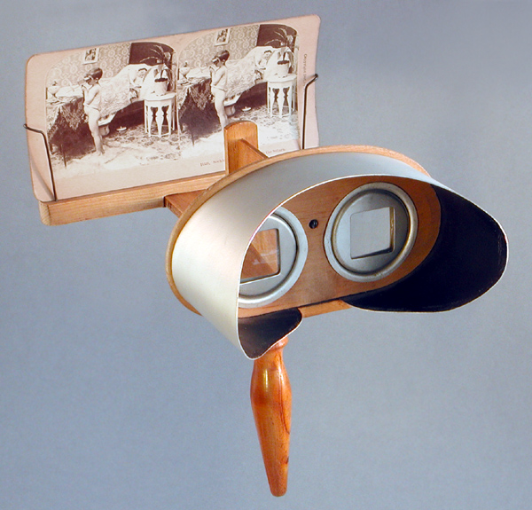 Stereoskop Holmesa, skonstruowany 1861, produkowany w latach 1861-1910 (fotografia własna ok. 2001 r).